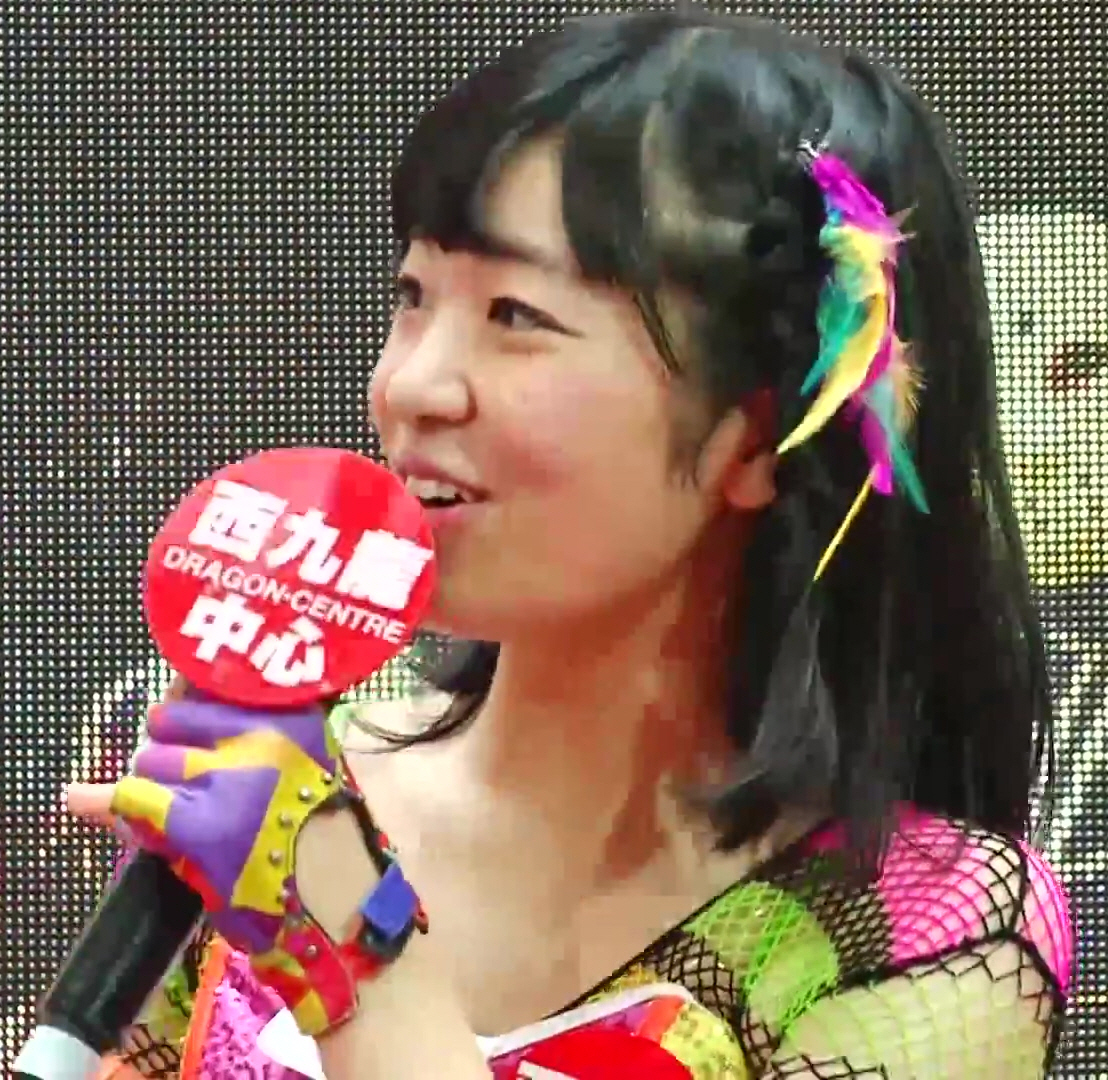 中文（香港）: 仮面少女 Fan Meeting in HK @ 西九龍中心